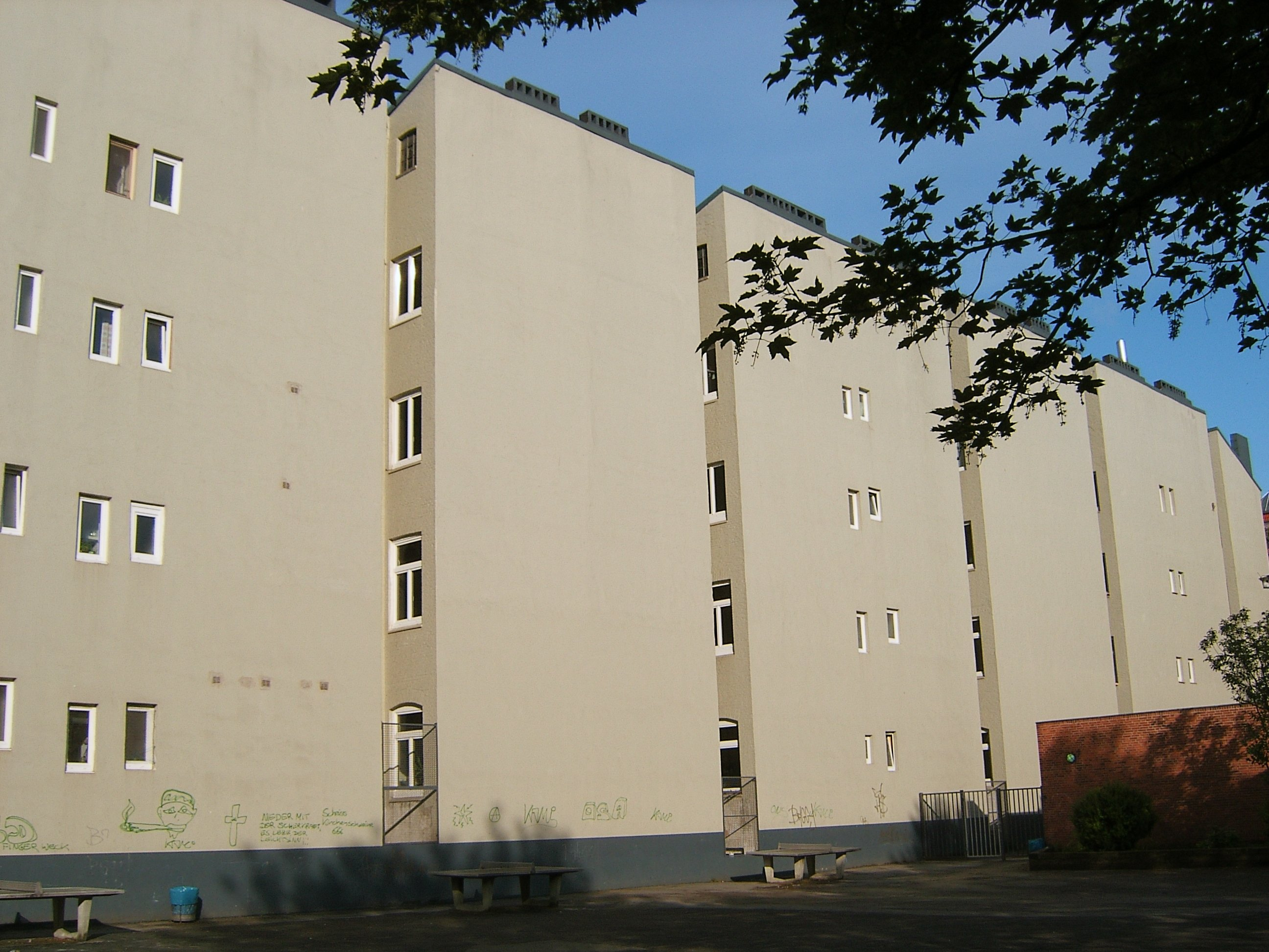 Schlitzbauten in St. Georg